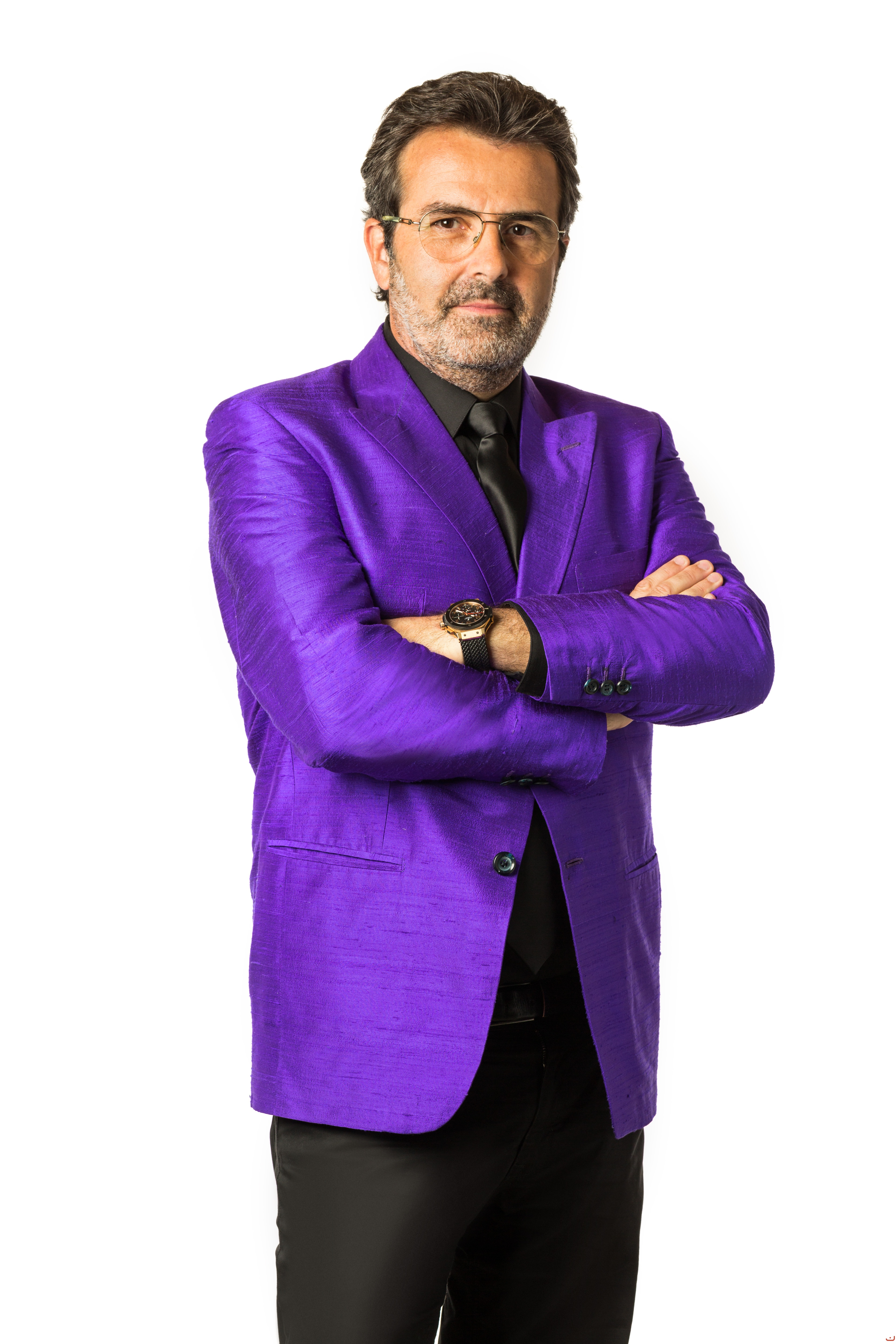 Xavier Sala i Martín (Foto extreta del seu blog) Economia en colors